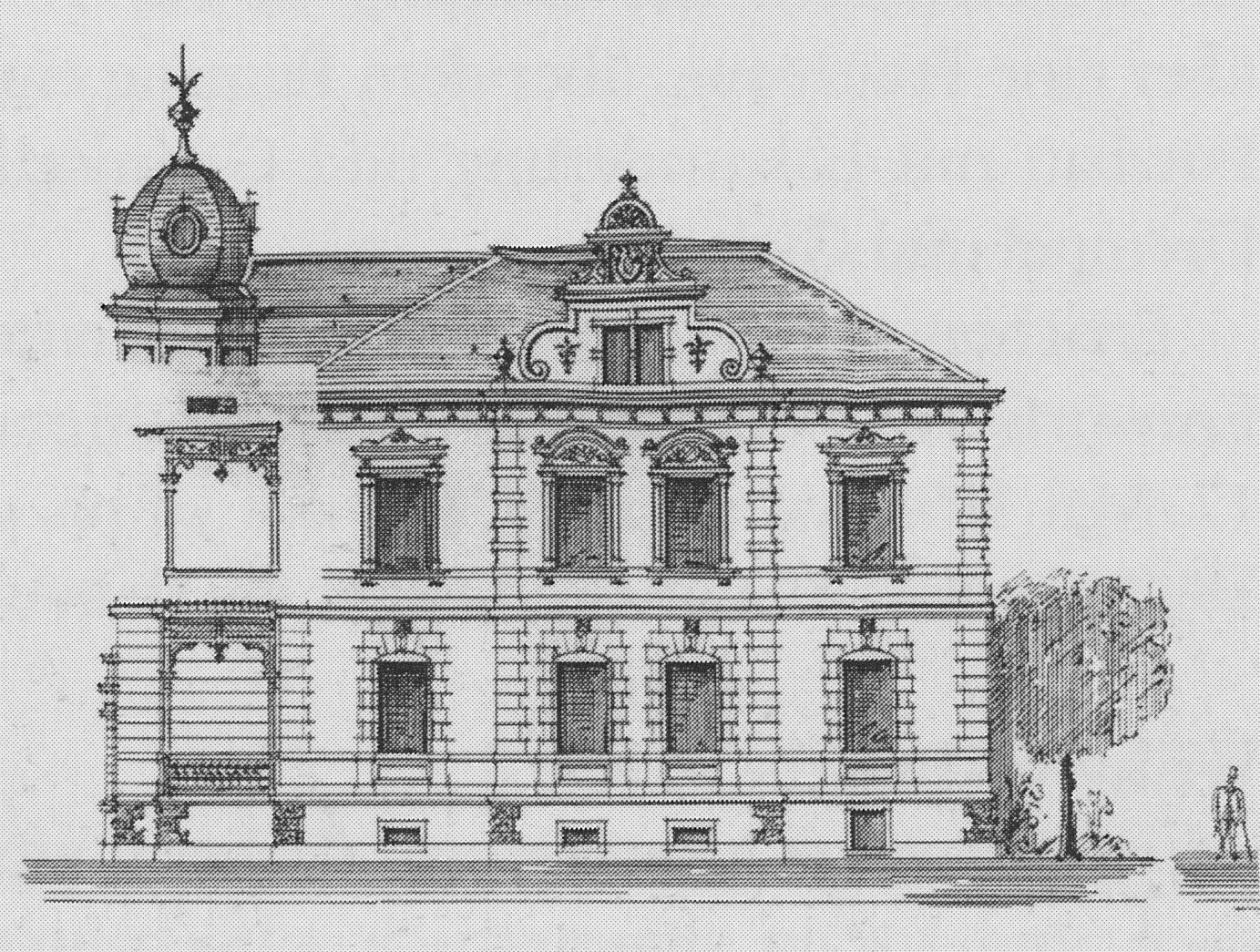 Radebeul Mietvilla Heinrich Emil Unger Bauzeichnung 1891